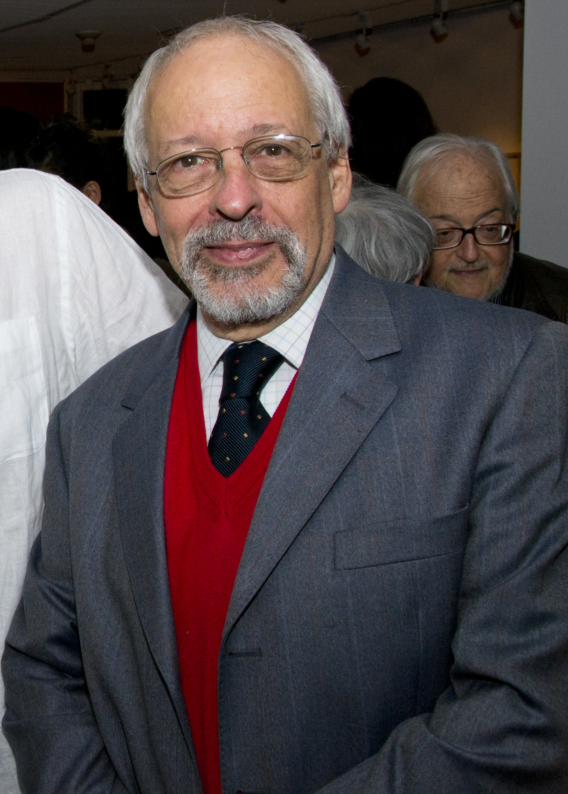 Ciudad de Buenos Aires, 15 de abril de 2014.- Se inauguró la muestra “Rep: atlas de las bellas artes” en el Museo Nacional de Bellas Artes. Estuvieron presentes el secretario de Cultura de la Presidencia de la Nación Jorge Coscia, la subsecretaria de Gestión cultural Marcela Cardillo, Quino, Osvaldo Bayer, Roberto Santoro, Milo Lockett, Horacio Verbitsky, Luis Felipe Noé y diversas figuras de la cultura argentina. Foto: Augusto Starita / Secretaría de Cultura de la Presidencia de la Nación.